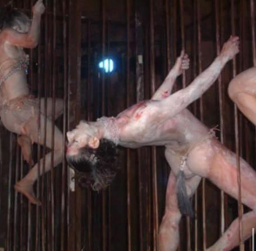 תמונת מחול